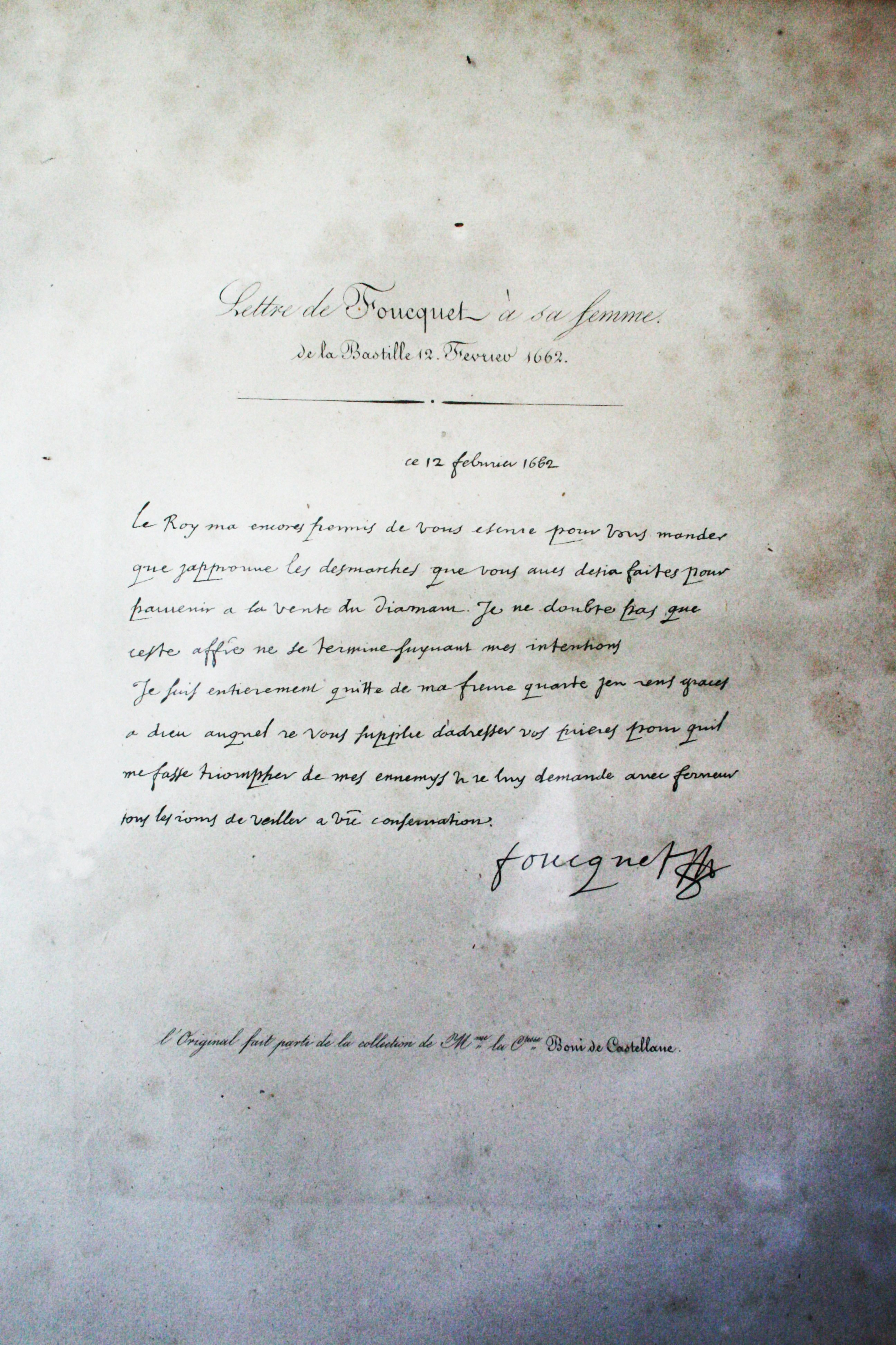 Lettre de Nicolas Fouquet à sa femme. Lithographie du XIXème dans le bureau de mon pere